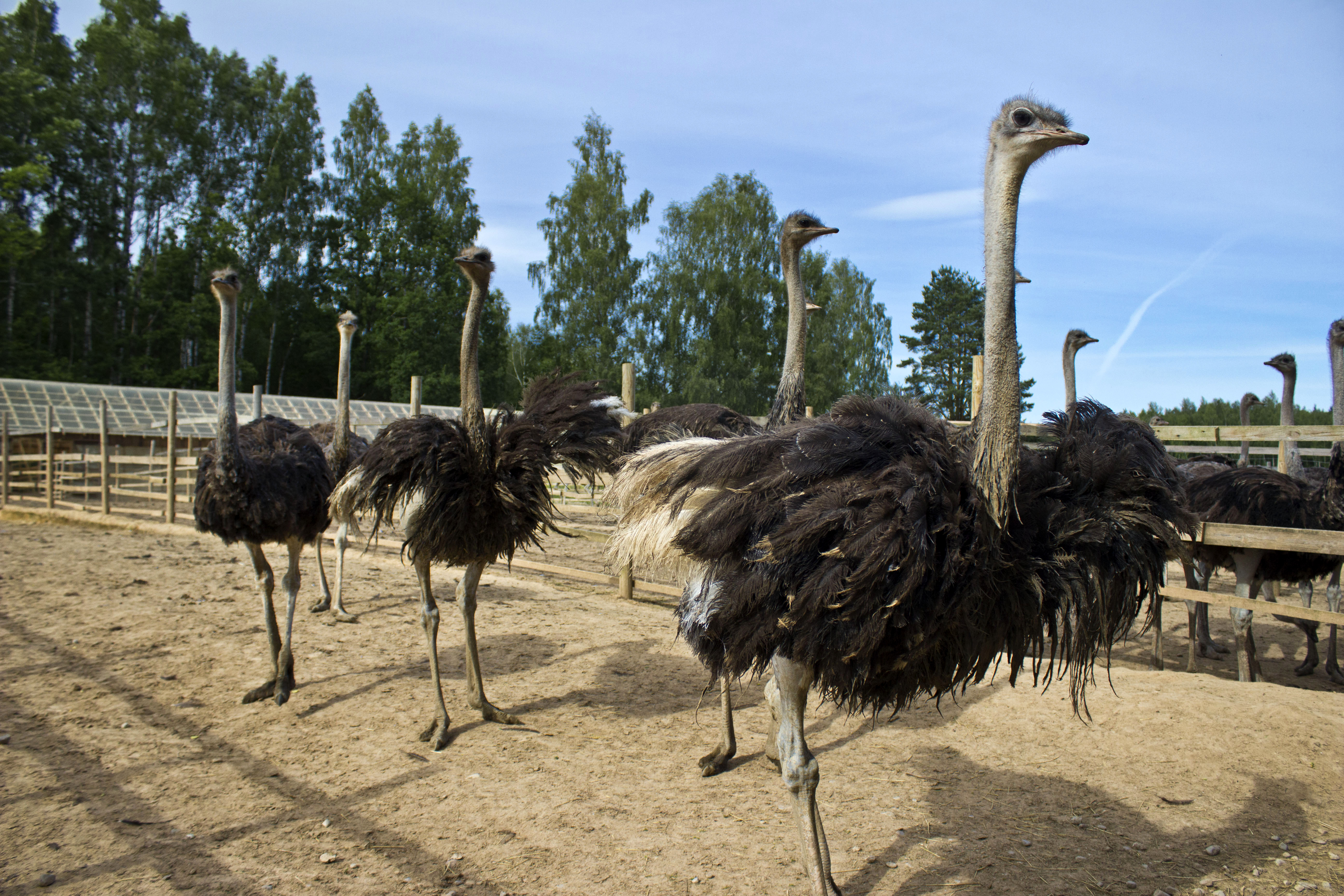 Nomnieki Snēpeles pagasts